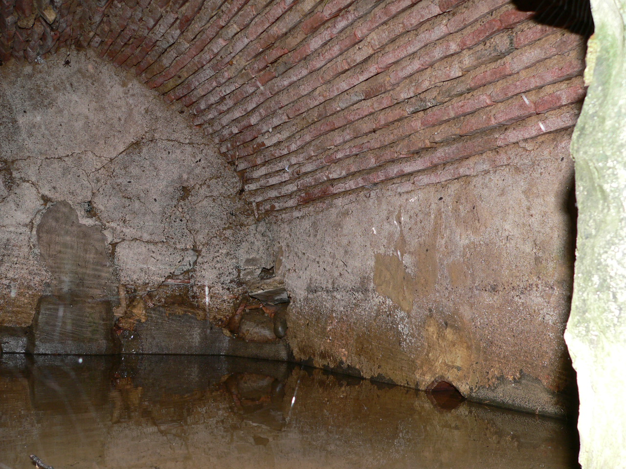 Arthez - houn Grausse - reservoir